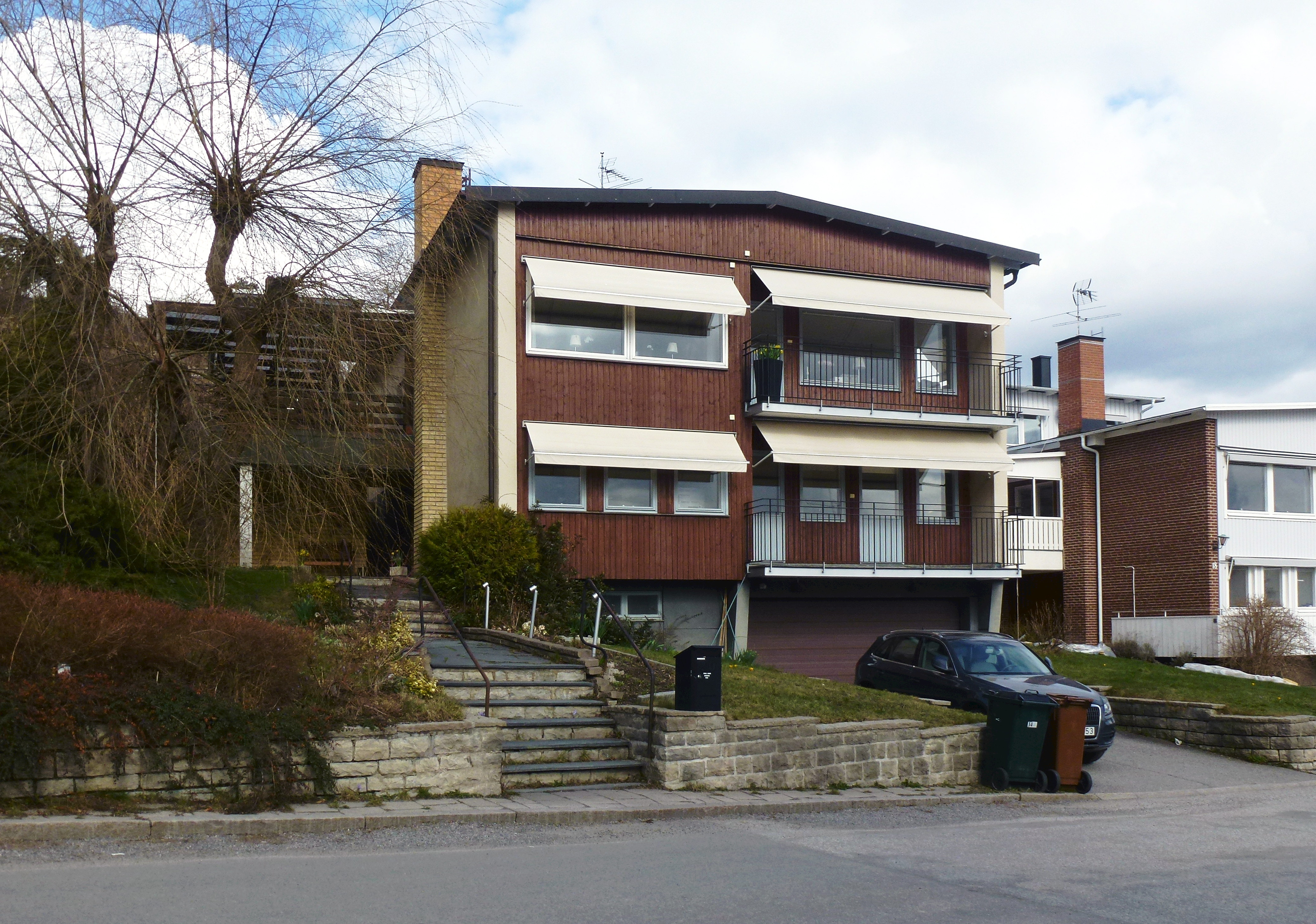 Arkitekt Karl G.H. Karlssons villa Grönviksvägen 20, Höglandet